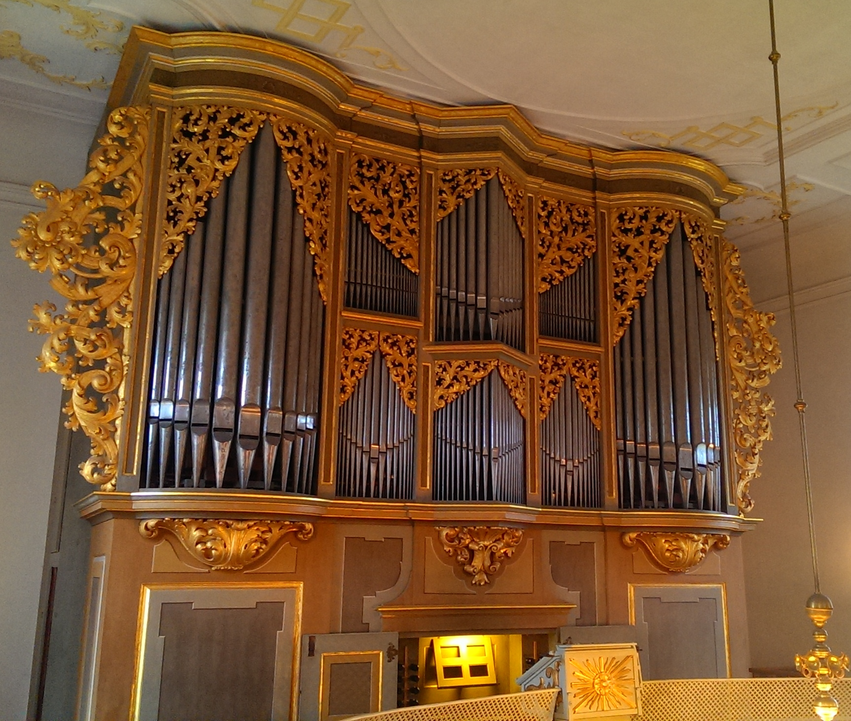 Silbermannorgel der ev. Girche St. Georg Großkmehlen